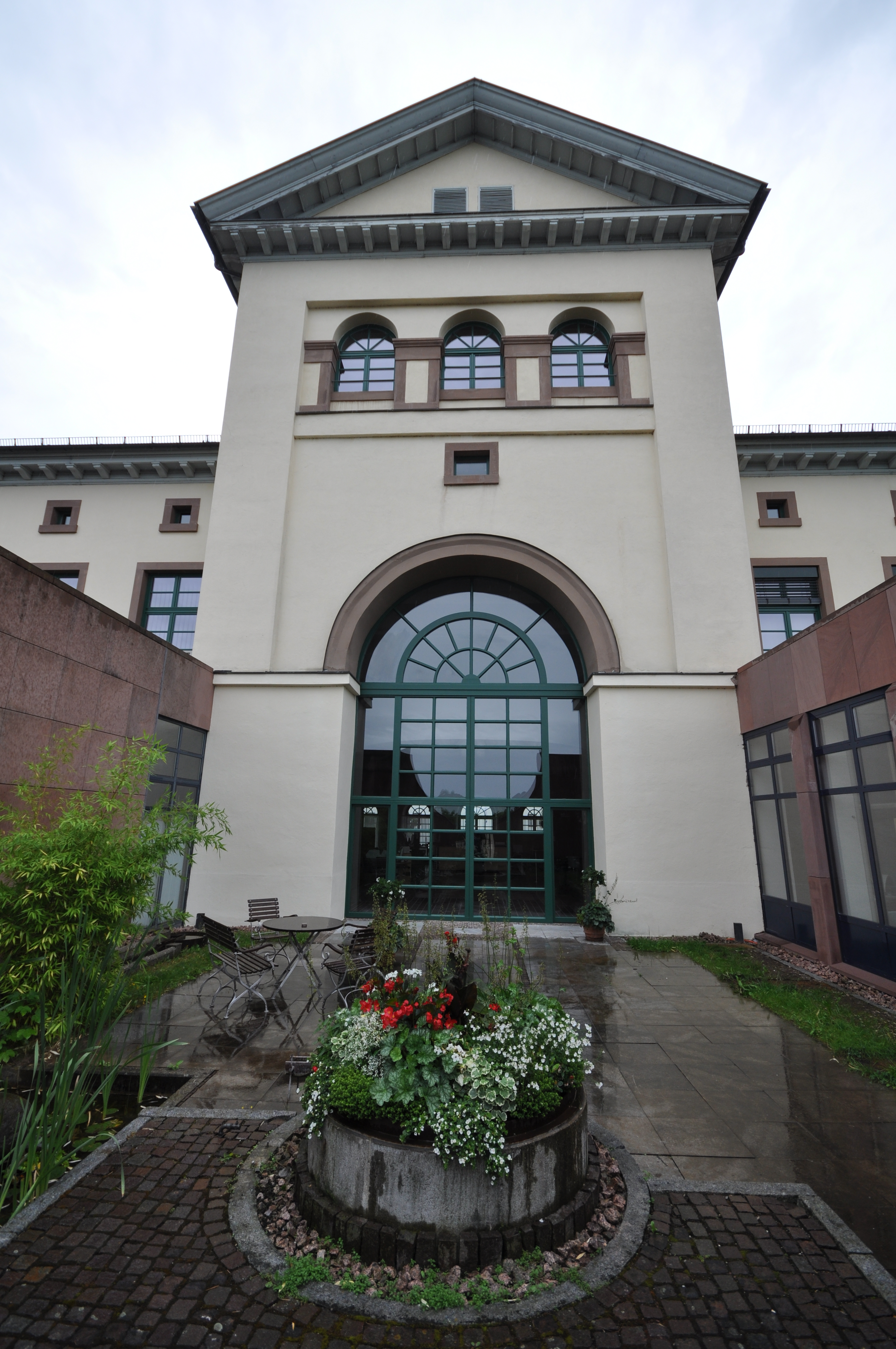 Hechingen